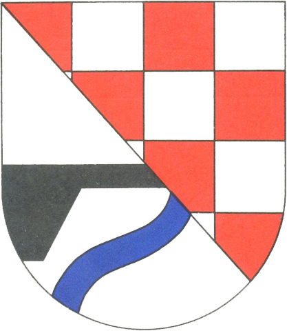 Wappen von Nohen